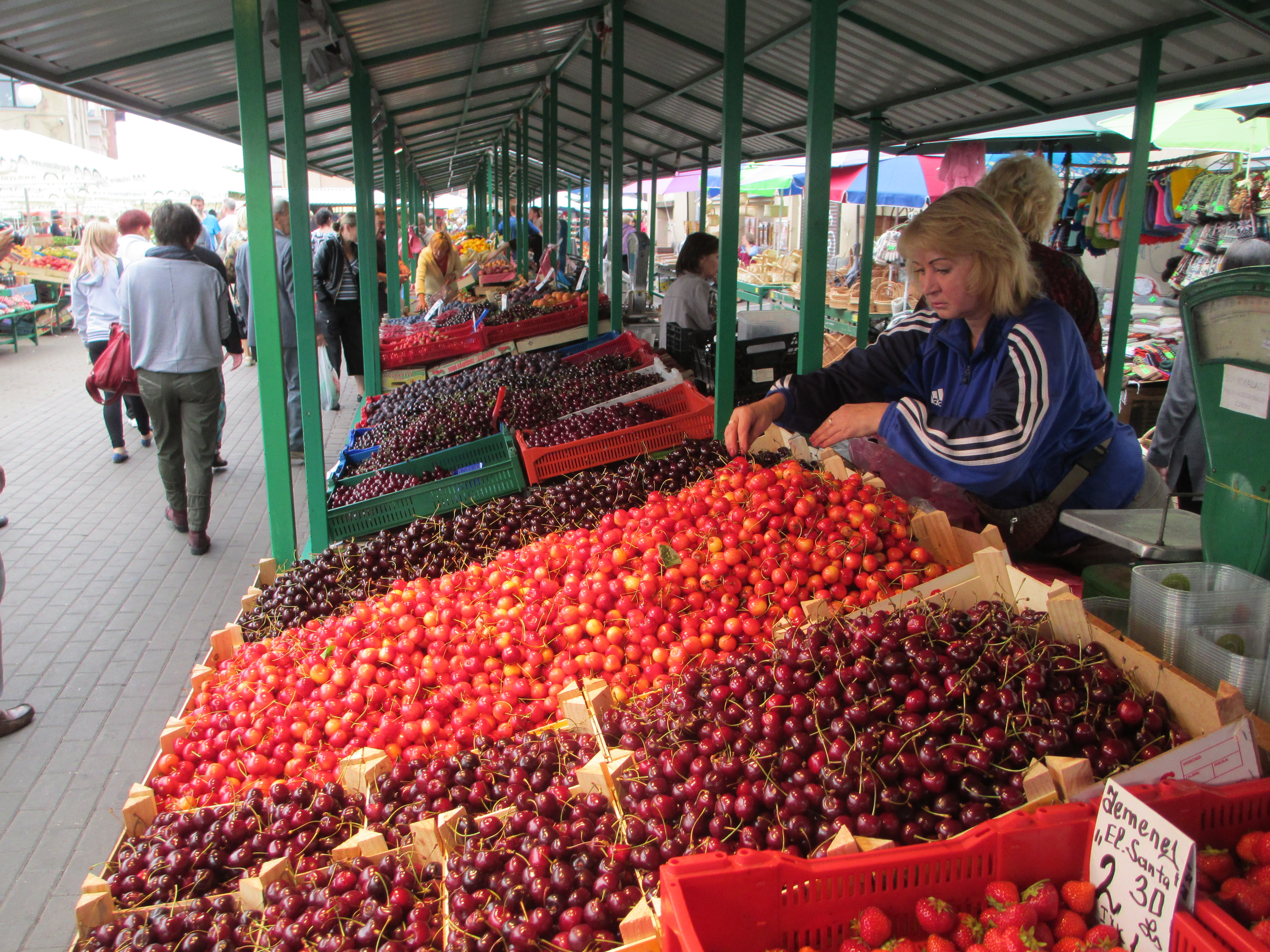 השוק המרכזי בריגה